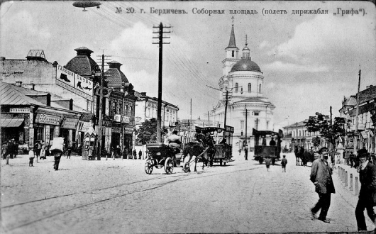 Дирижабль «Гриф» в Бердичеве